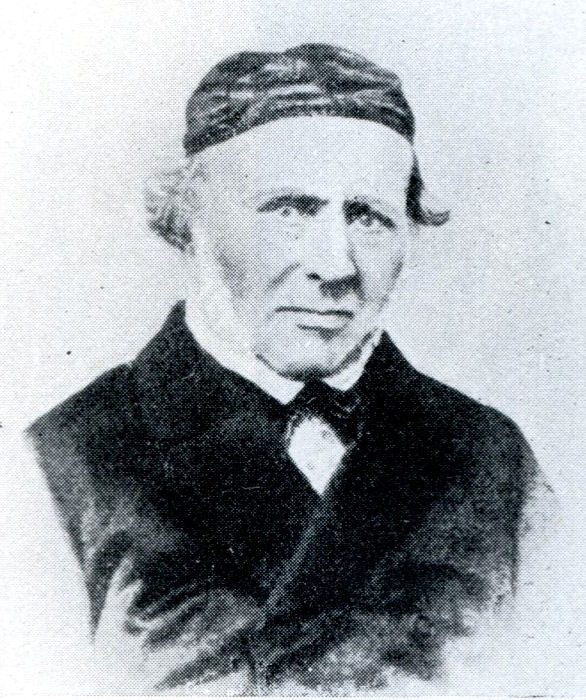 Hofrath Christian Ludwig Bernhard Engel (1788-1871)